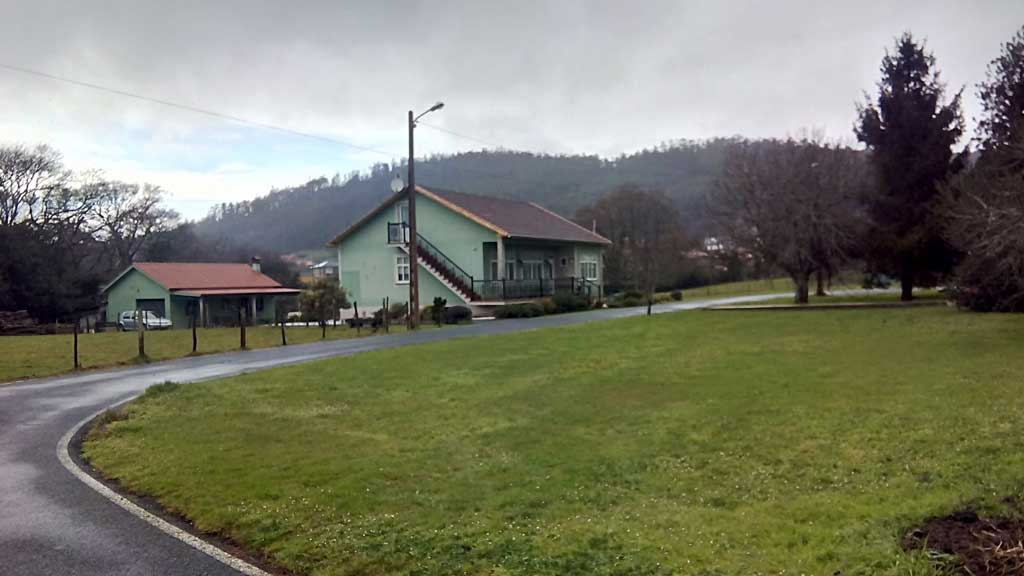 Vista do Catasol, Pedroso, Narón.